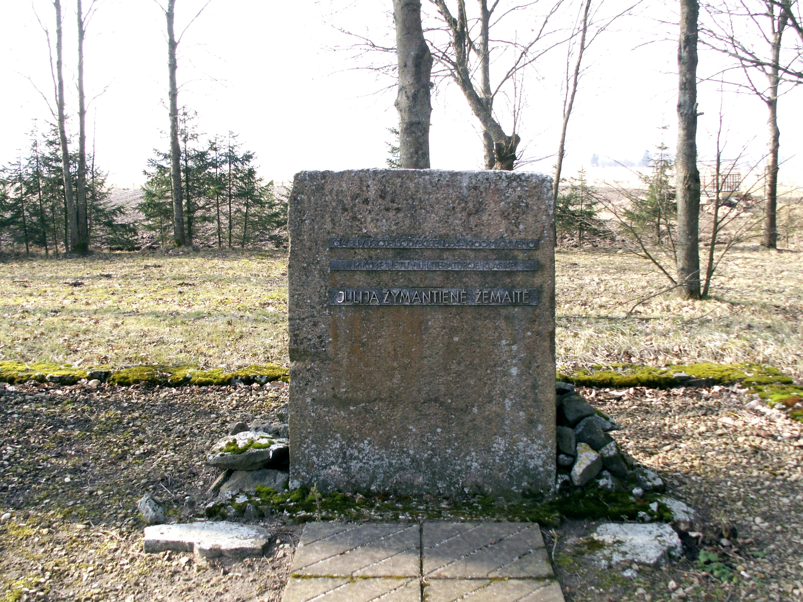 Ušnėnai, akmuo Žemaitės namo vietoje